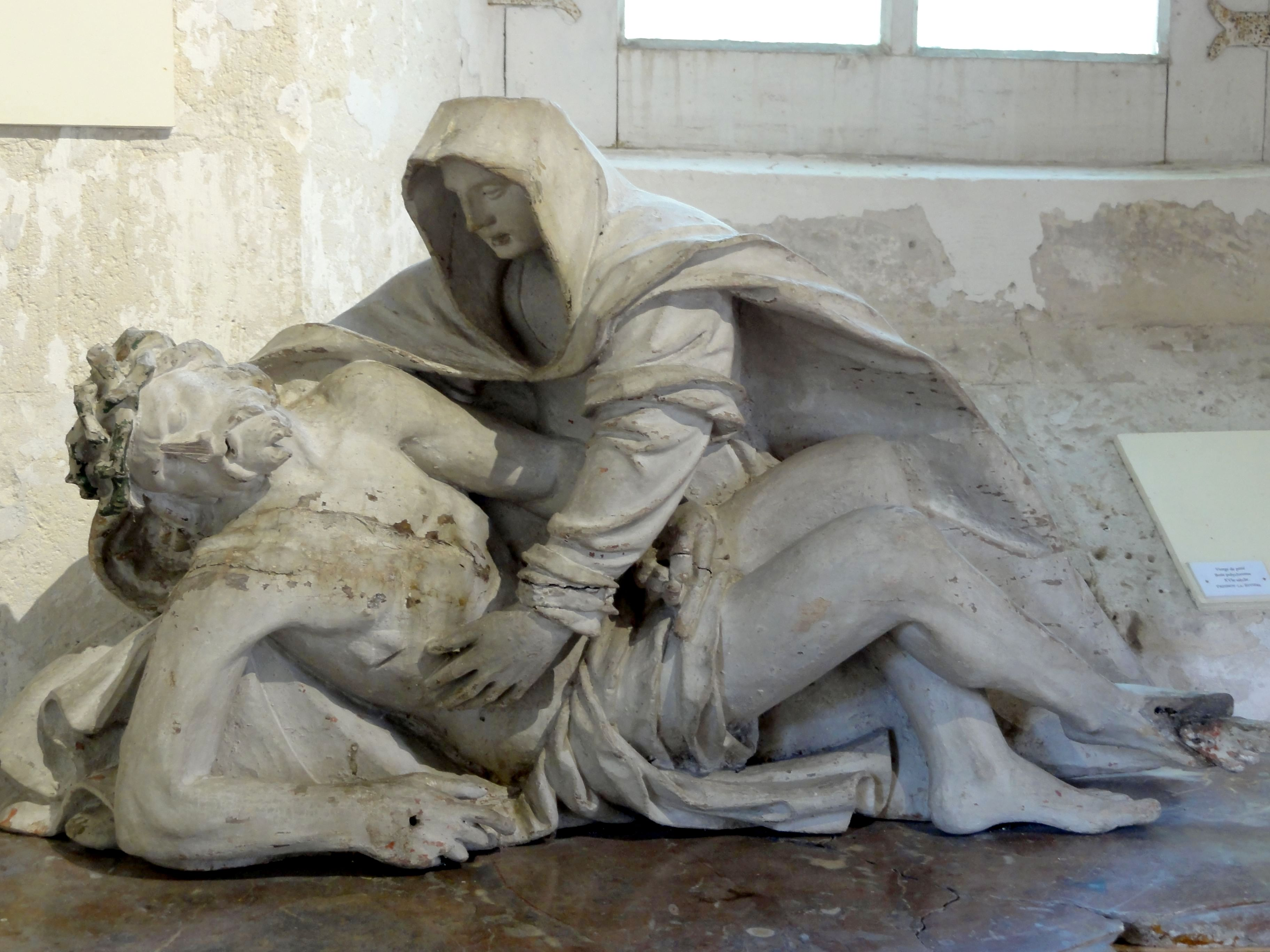 Pietà, bois polychrome, XVIe siècle.